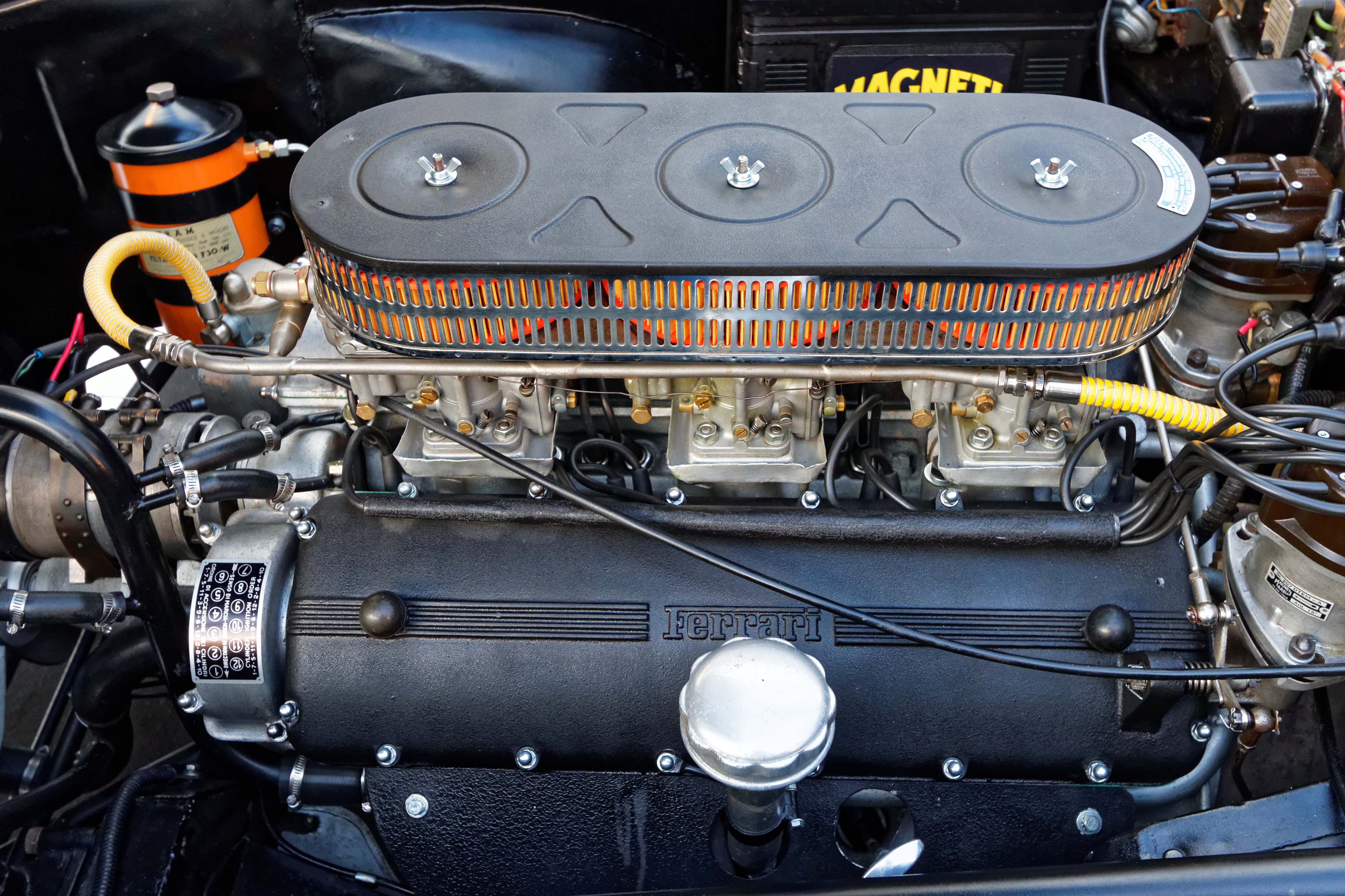 La vente aux enchères RM auctions aux pied des Invalides à Paris le 4 février 2015.